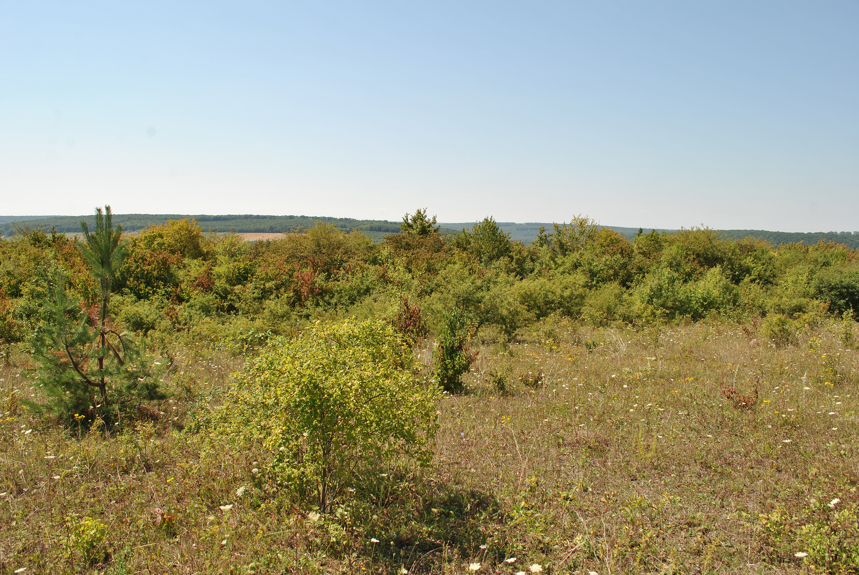 Ботанічна пам'ятка природи місцевого значення «Берем'янська наскельно-степова ділянка» в урочищі «Червона гора» на північному схилі долини р. Дністер, нижче по течії від гирла р. Стрипа біля с. Берем'яни Бучацького району Тернопільської області. Вигляд з луки на північний край ділянки над урвищем Червоної гори.